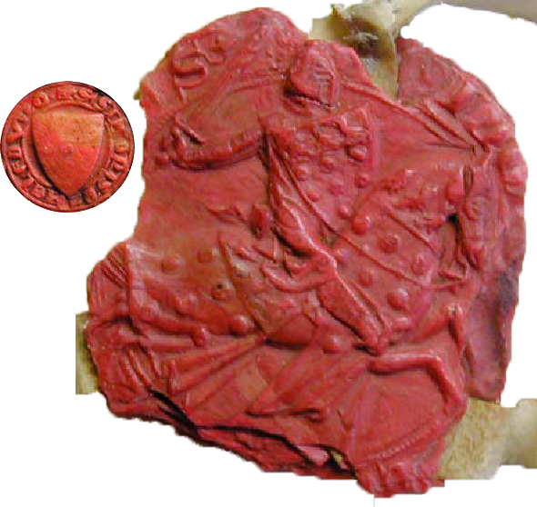 cf le titre.